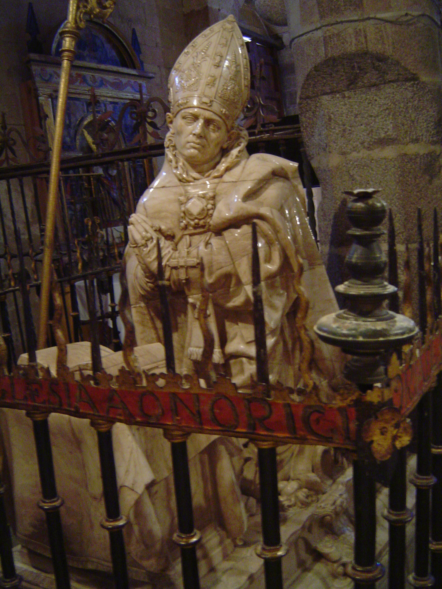 Tumba de San Segundo. Ávila